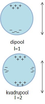 Tegemist on elektrilise dipooli järgu kasvuga vastavalt sellele kui suurendame metallist osakese suurust.